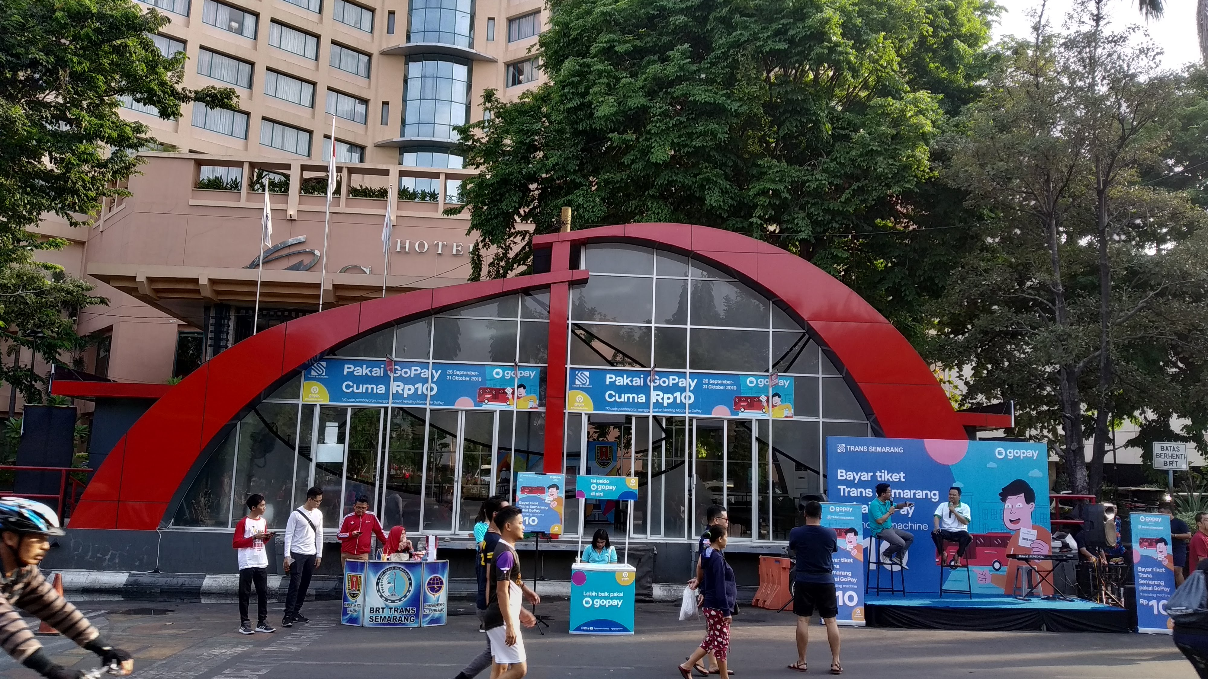 Foto depan halte Simpang Lima untuk layanan Trans Semarang ketika car free day. Catatan mengenai stiker ajakan menggunakan Gopay di atas pintu keberangkatan, hal itu dikarenakan ketika foto ini diambil, tepat satu tahun Trans Semarang melayani pembayaran menggunakan Gopay